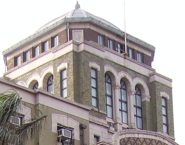 司法大廈的尖塔。(2006年4月) Bân-lâm-gú: Su-huat Tāi-hā ê tsiam-thah.(2006-nî 4-gue̍h)